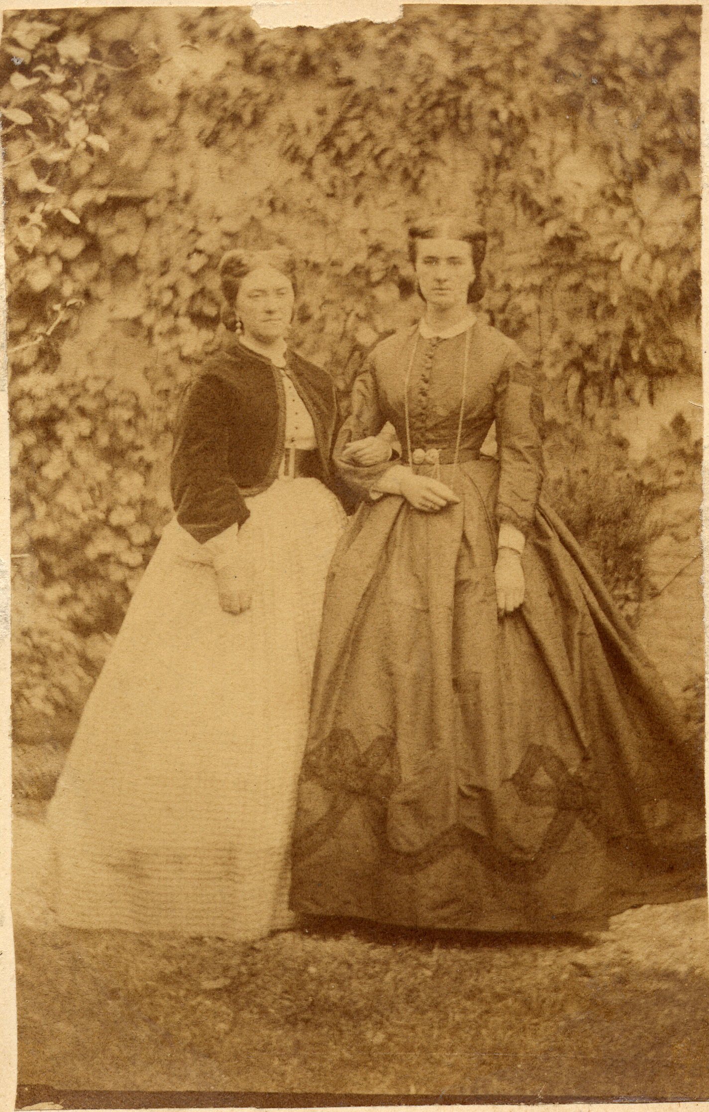 à gauche: Hermine Straatman (future épouse de Léon Philippe van Dievoet) accompagnée de sa soeur Anna Straatman (future épouse du général Prosper Beaudrihaye) (à droite)